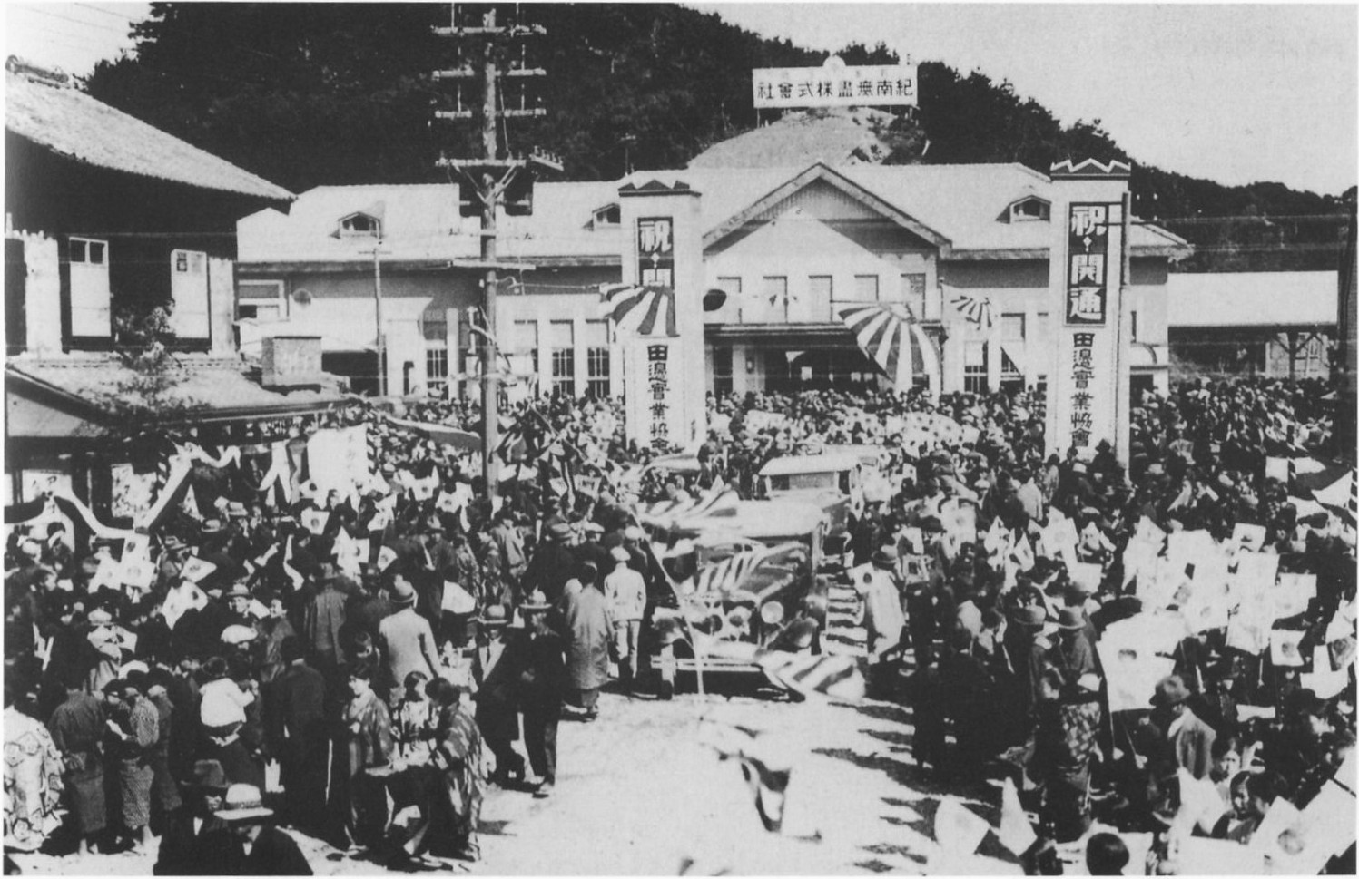 紀伊田辺駅での開通祝賀風景。『別冊一億人の昭和史 和歌山県の昭和史』(毎日新聞社、1982年)P128にも画質は悪いが掲載されている。